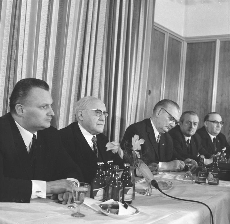 Eisenach, Begegnung mit Kirchenvertretern Zentralbild Franke, 10.1.1969 Eisenach: Begegnung mit Amtsträgern der Evangelisch-Lutherischen Kirche Thüringens Zu einer freundschaftlichen Begegnung hatte der Staatssekretär für Kirchenfragen Hans Seigewasser (3.v.l.) , am 9.1.1969 in der Wartburgstadt Eisenach kirchliche Amtsträger und Vertreter der staatlichen Organe der Bezirke Erfurt, Gera und Suhl eingeladen. Auf dem in den ersten Januartagen eines jeden Jahres zur guten Tradition gewordenen mehrstündigen Gespräch wurden von Staatssekretär Seigewasser, Landesbischof D.Dr. Moritz Mitzenheim (2.v.l.) und vom Mitglied des Präsidiums des CDU-Hauptvorstandes Hermann Kalb (1) die Erfolge des langjährigen gemeinsamen Wirkens bei der Festigung der sozialistischen DDR und der Herausbildung der sozialistischen Menschengemeinschaft gewürdigt. Abgebildete Personen: Seigewasser, Hans: Staatssekretär für Kirchenfragen, Volkskammerabgeordneter, DDR (GND 127039031) Mitzenheim, Moritz Dr.: Landesbischof von Thüringen, Vaterländischer Verdienstorden (VVO) in Gold 1961, DDR (GND 11873427X) Kalb, Hermann: Stellvertretender Staatssekretär für Kirchenfragen, DDR